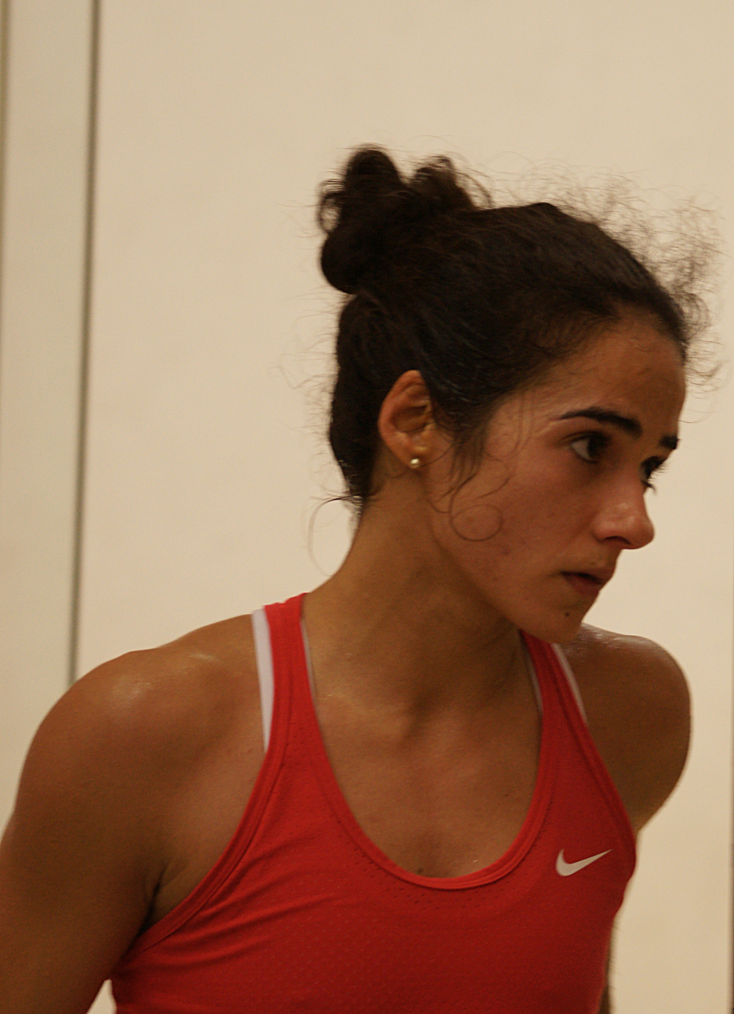 Nicolette Fernandes, Monte-Carlo squash classic 2015